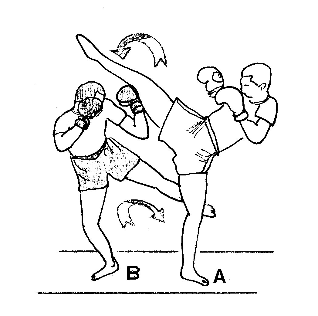 esquive_abaiss.jpg